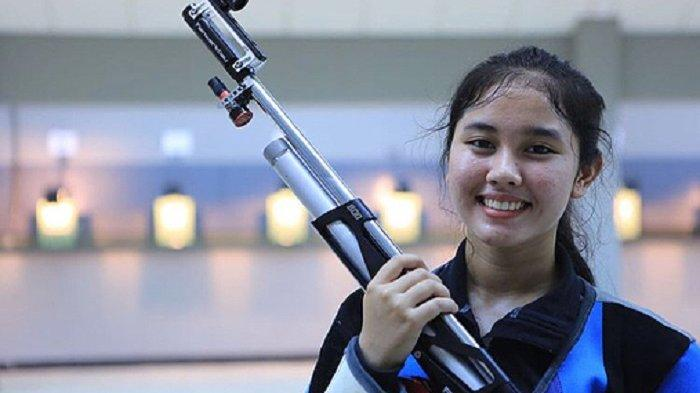 Vidya Rafika Rahmatan Toyyiba, atlet tembak asal Kabupaten Bekasi raih medali emas cabang olahraga tembak di ajang SEA Games 2019 di Filipina, Selasa (3/12/2019).